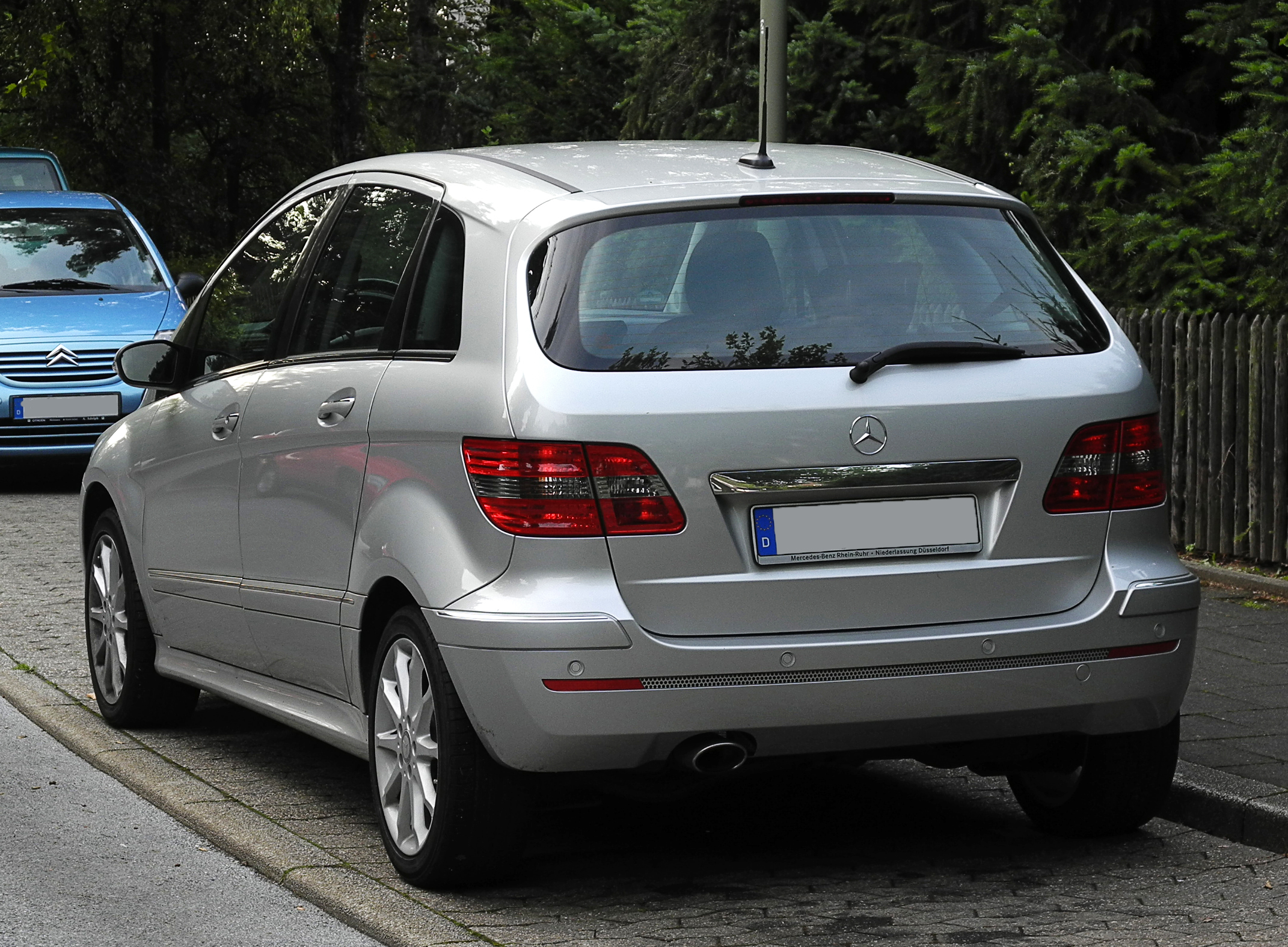 Mercedes-Benz B 180 CDI (T 245)